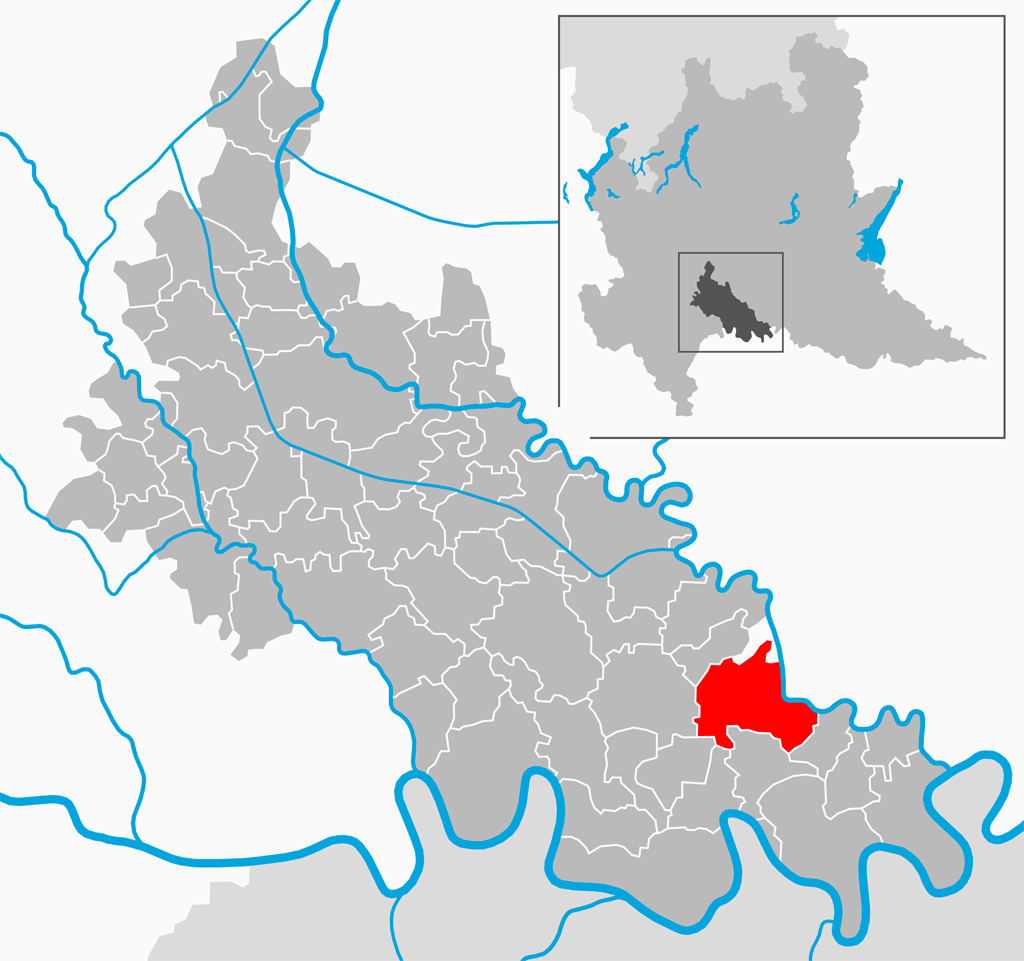 Il comune di Maleo nella provincia di Lodi